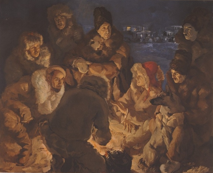 Les responsables du groupe Pamir et du groupe Chine bivouaquant au Xinjiang après leur retrouvailles. Tiré d'une série de cinquante dessins et peintures réalisés par Alexandre Yakovlev pendant l'expédition Citroën Centre-Asie en 1931 - 1932. Planche nr 2. (Croisière Jaune). Troisième mission G.-M. Haardt, L. Audouin-Dubreuil. Éditée sous la direction de Lucien Vogel en 1934.